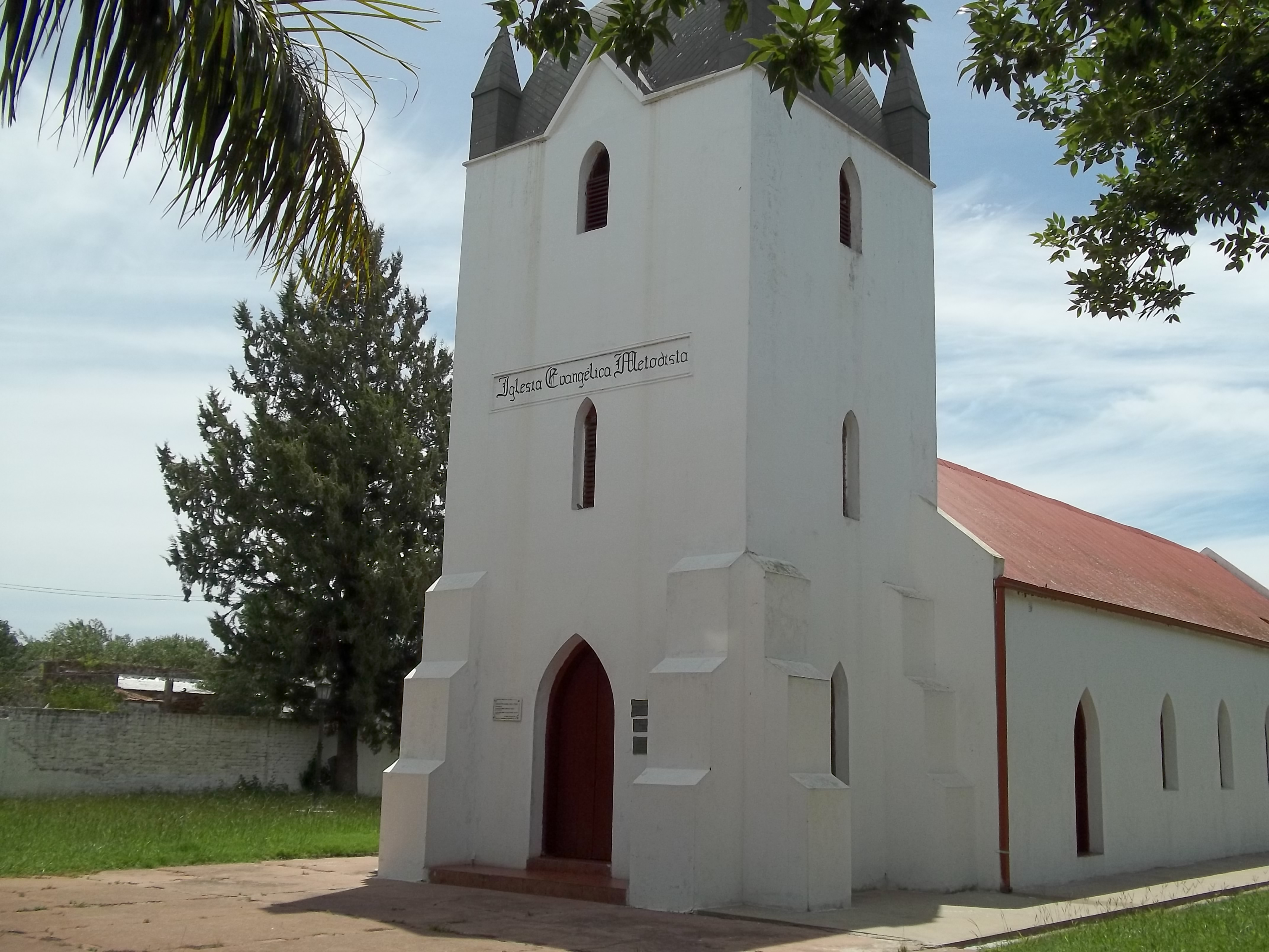 Templo Protestante de la localidad de Alejandra (Santa Fe)